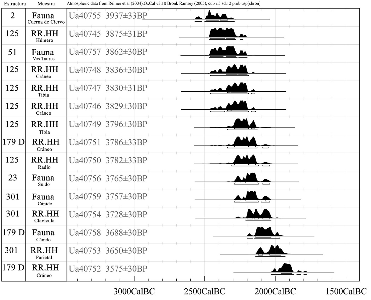 Serie de gráficos de probabilidad de las calibraciones de dataciones C 14 de muestras procedentes del poblado calcolítico “Venta del Rapa” (Mancha Real, Jaén). RR HH Restos Humanos.